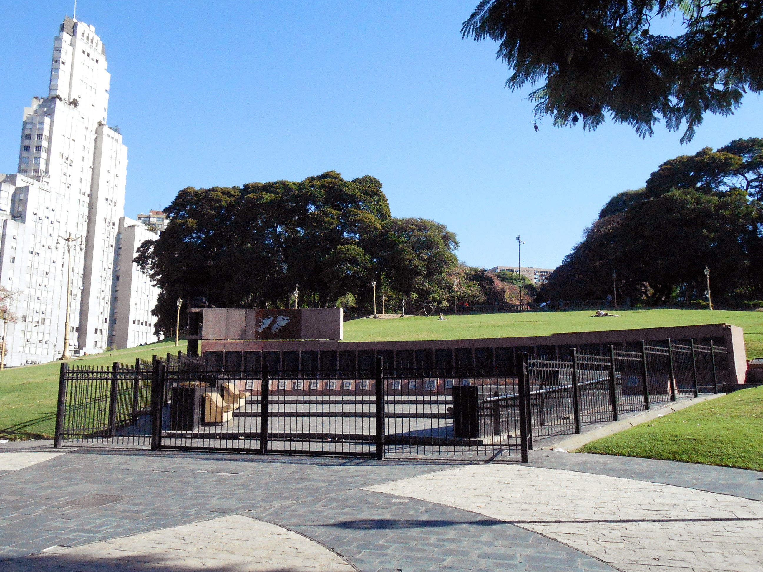 Monumento a los caidos en Malvinas - Buenos Aires